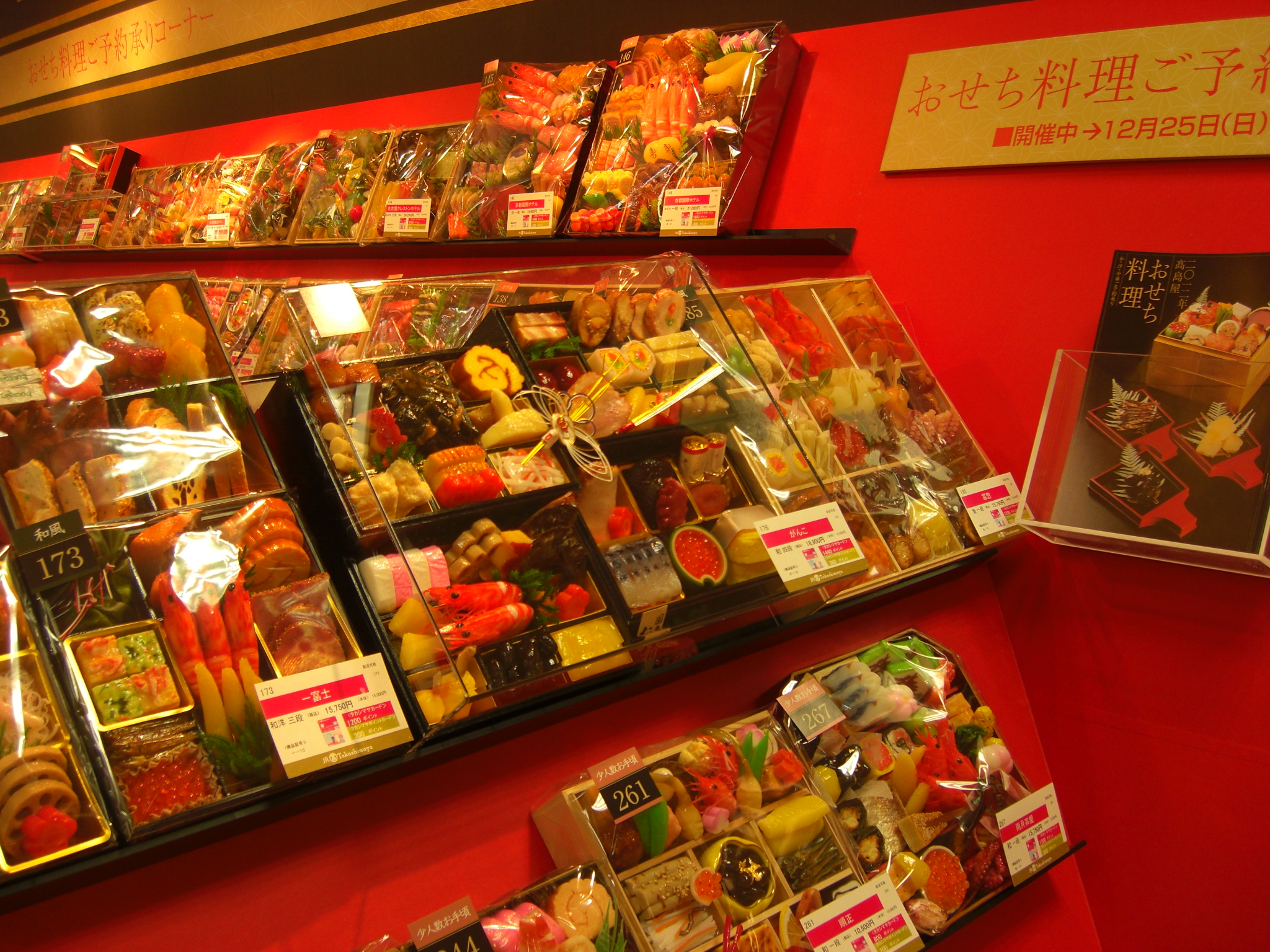 名古屋高島屋のおせち予約コーナー